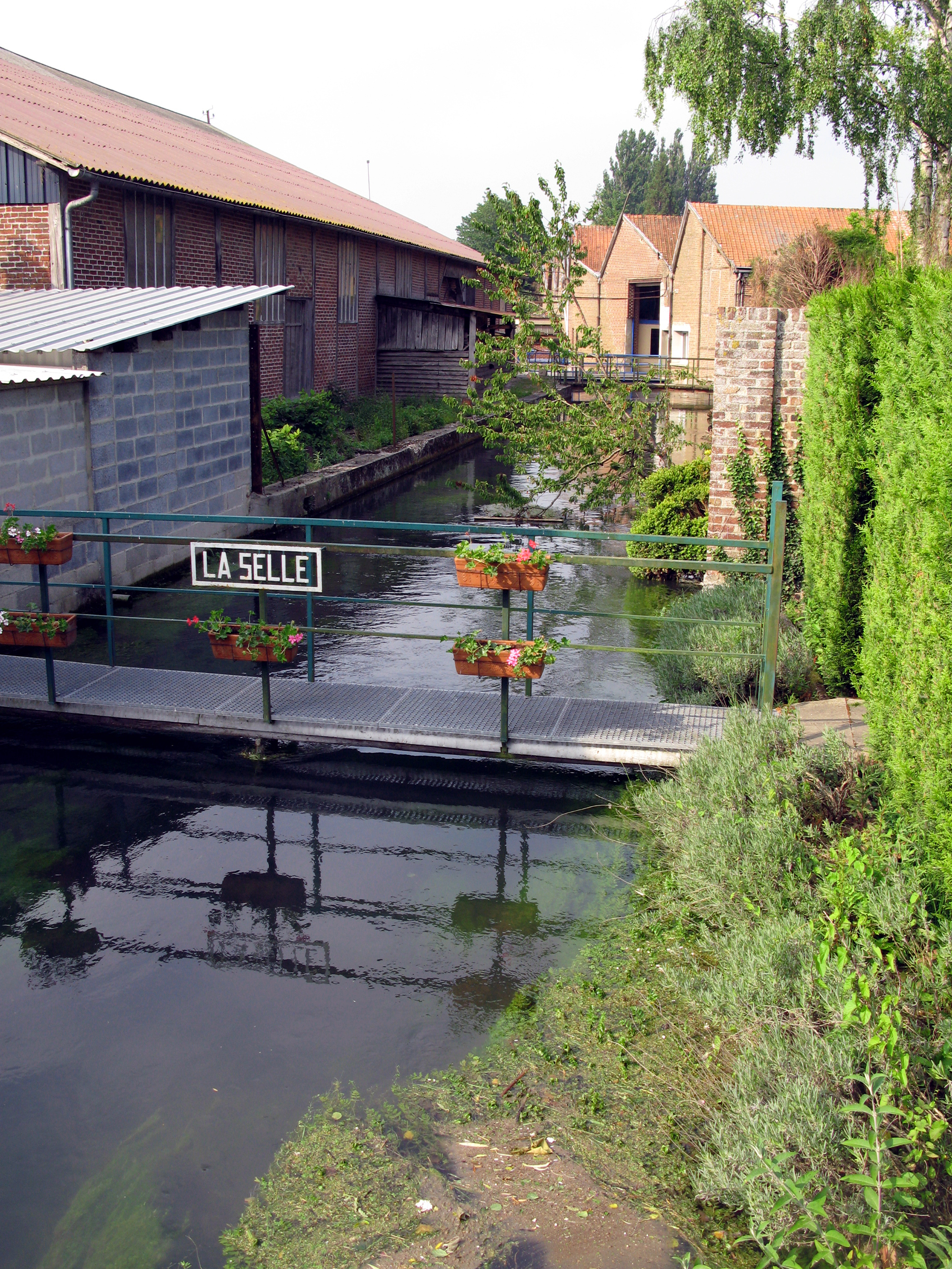 Loeuilly (Somme, France) - La Selle.